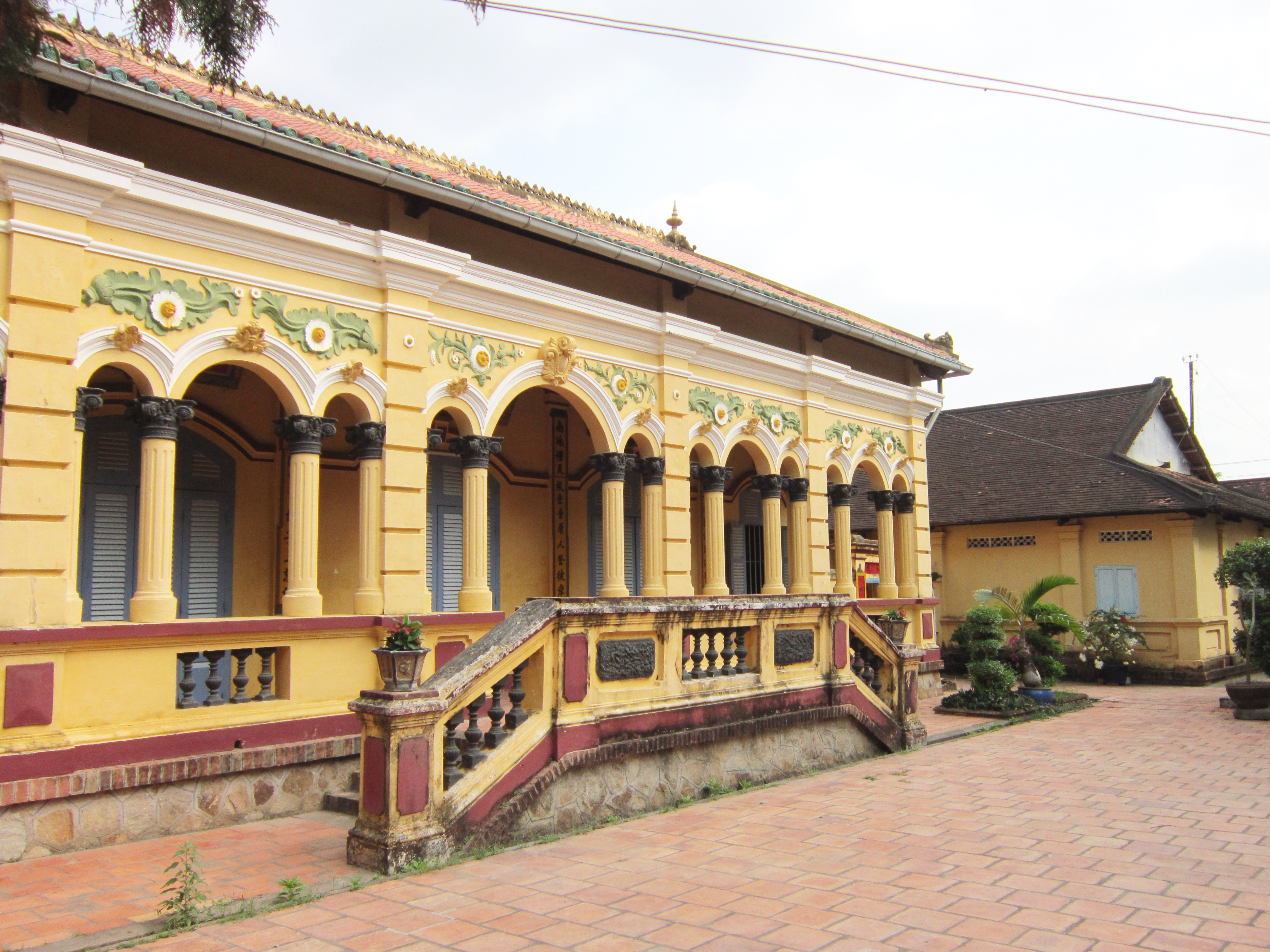 Chính điện chùa Nam Nhã tọa lạc ở số 612, đường Cách Mạng Tháng Tám, phường An Thới, quận Bình Thủy, thành phố Cần Thơ, Việt Nam.